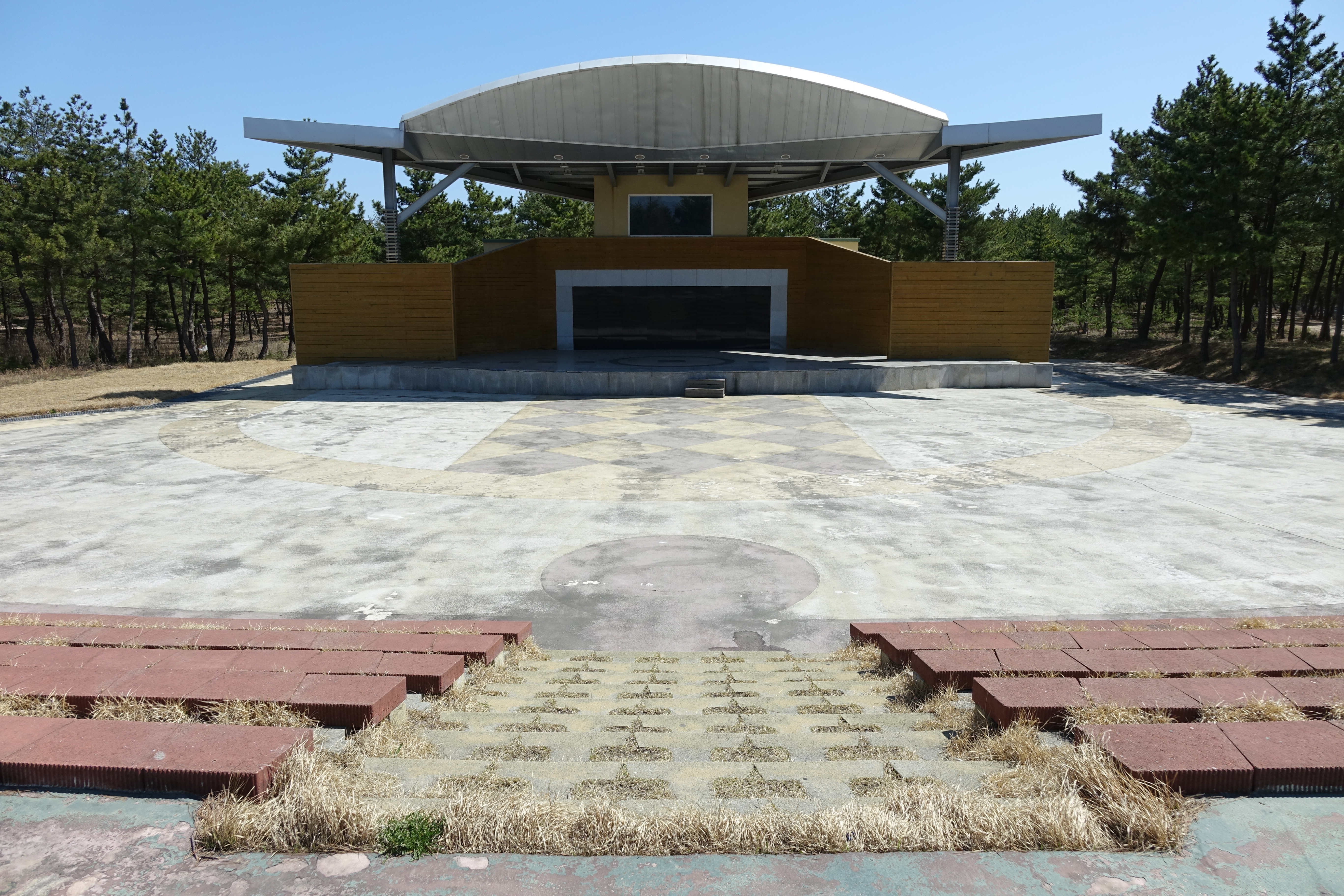 2016년 4월 강원도 강릉시 강원도립대학교